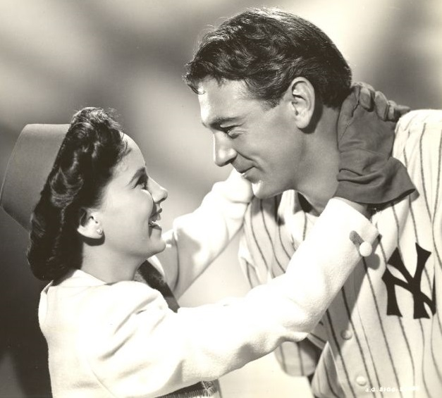 映画「打撃王」の広報用写真。ゲイリー・クーパーとテレサ・ライト